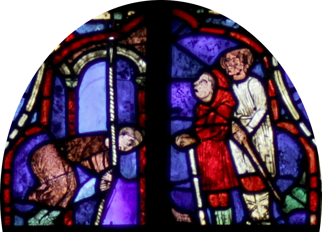 le zodiaque et les travaux des mois (lancette gauche, baie 28a). Donateurs (?) scène de sonnage de cloche.